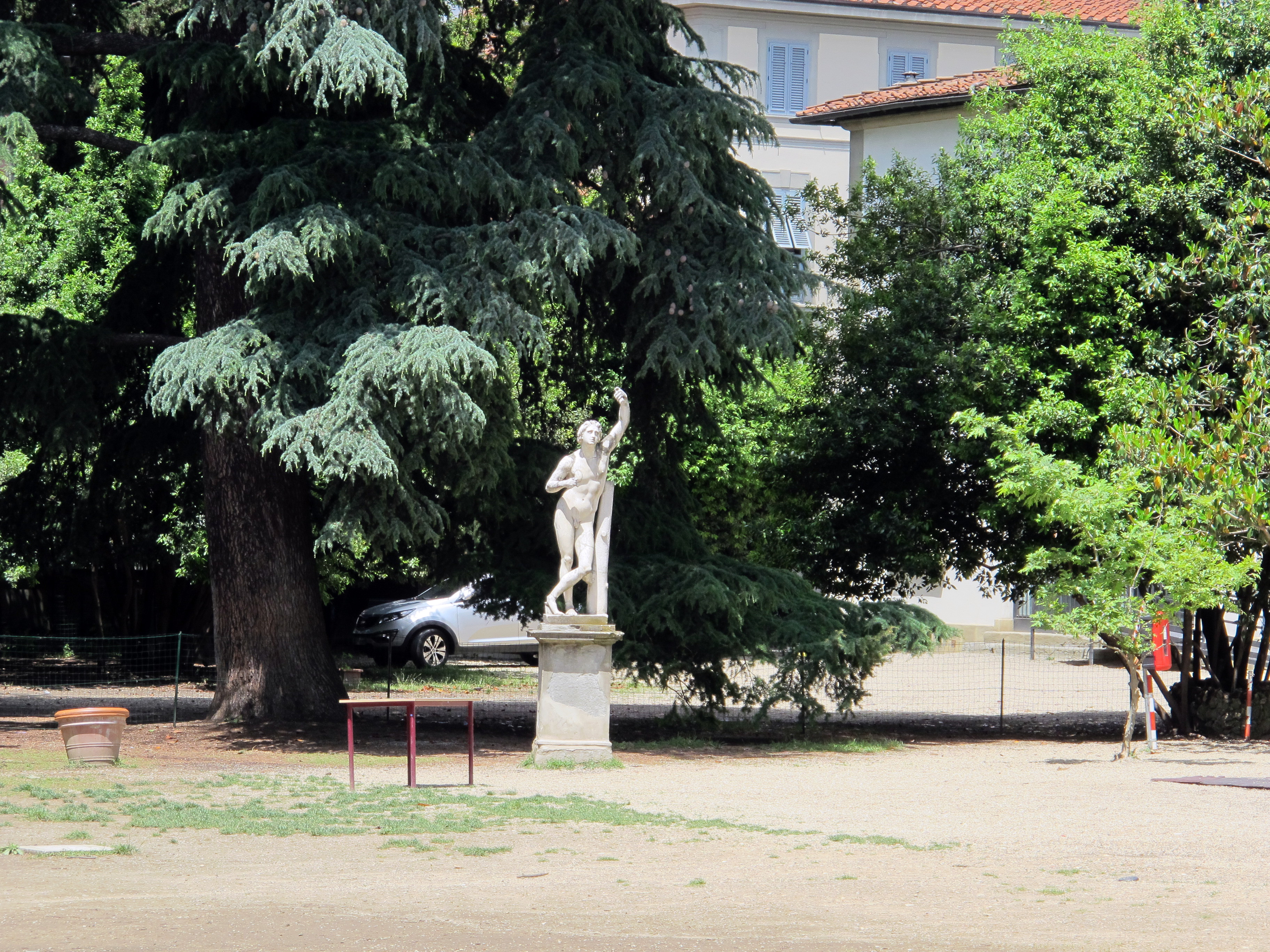 Orti oricellari, statua